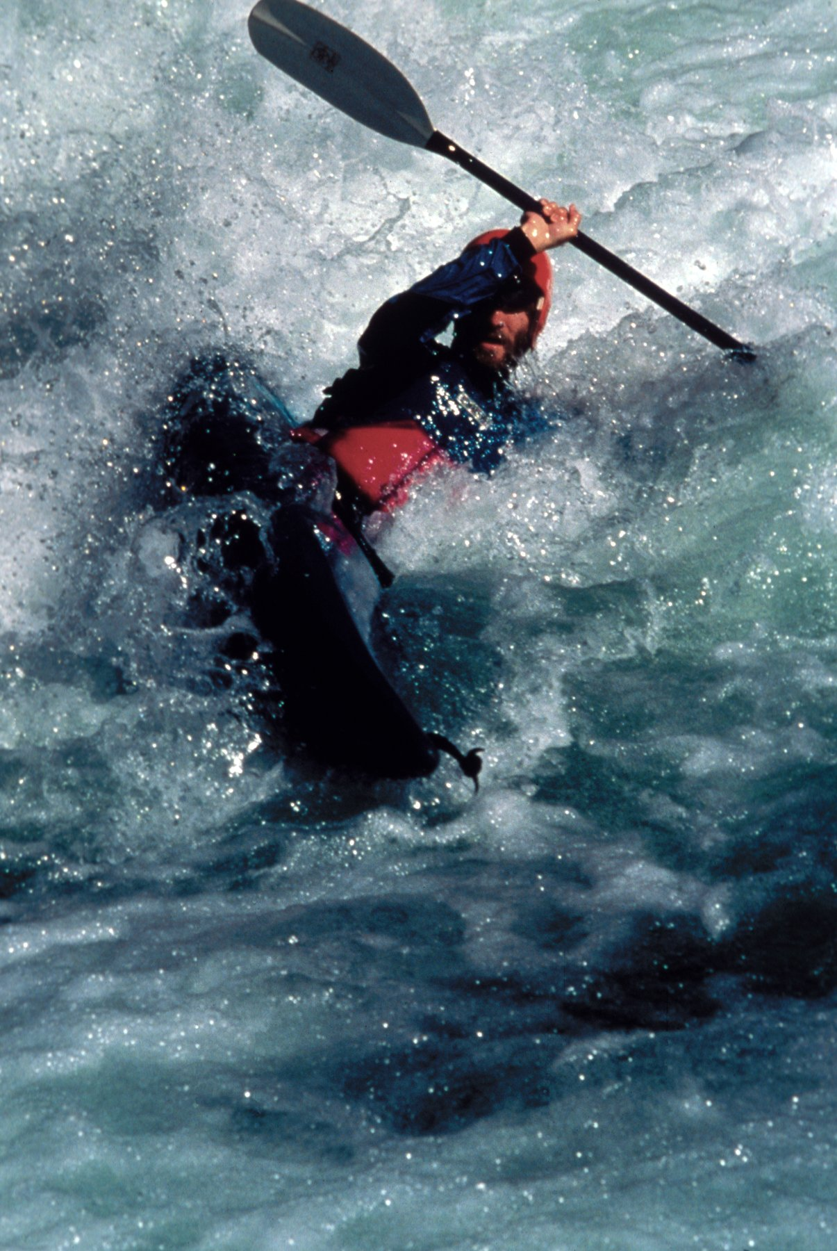 Whitewater kayaking